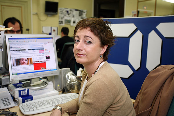 Rocío Ramos-Paúl (Supernanny).